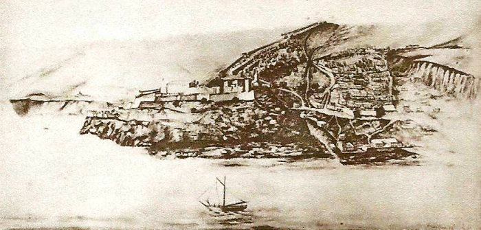 Gravure de la ville d'Oran vers 1750